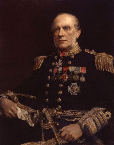 Retrato de Sir Edward Augustus Inglefield